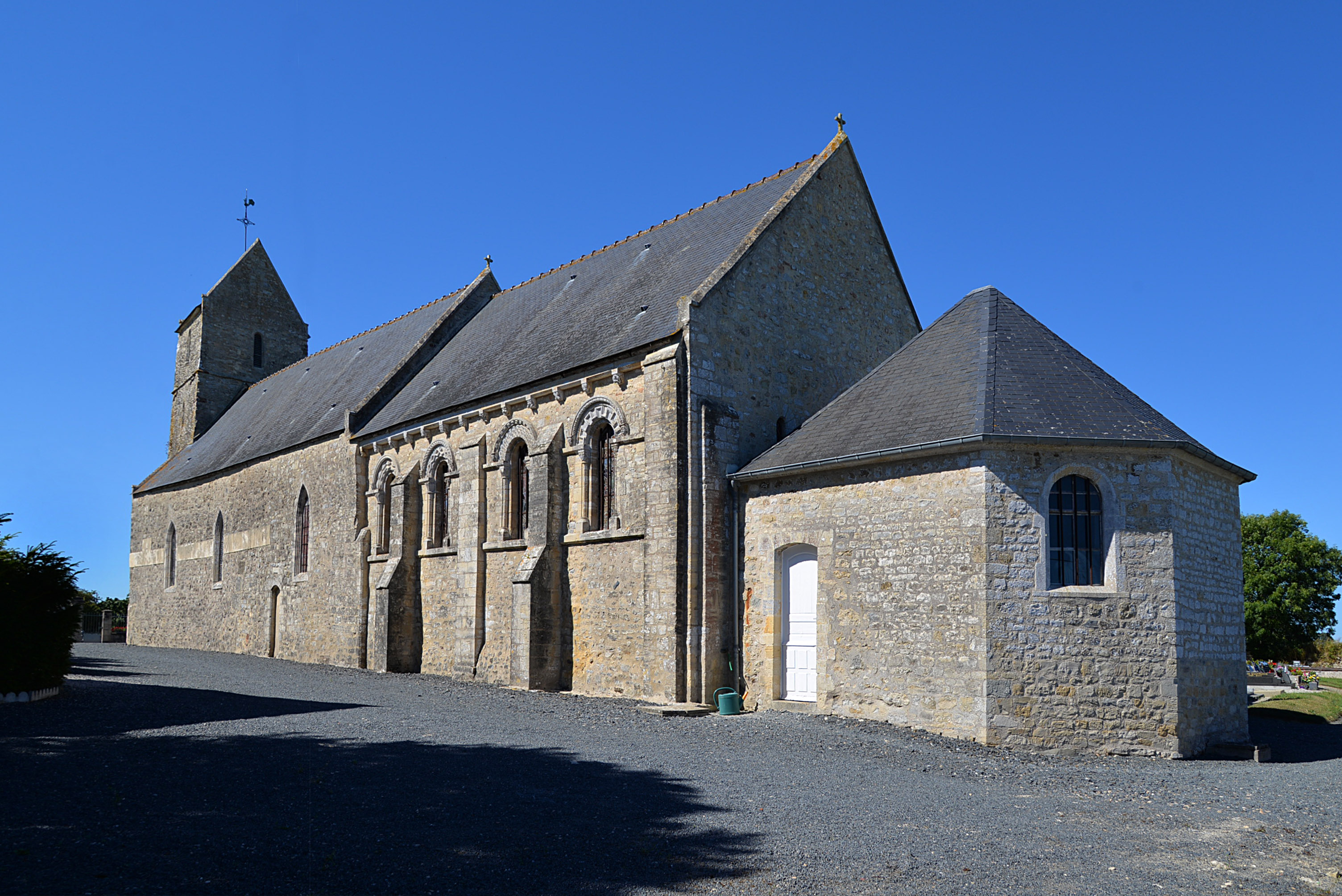 Vouilly (Calvados)